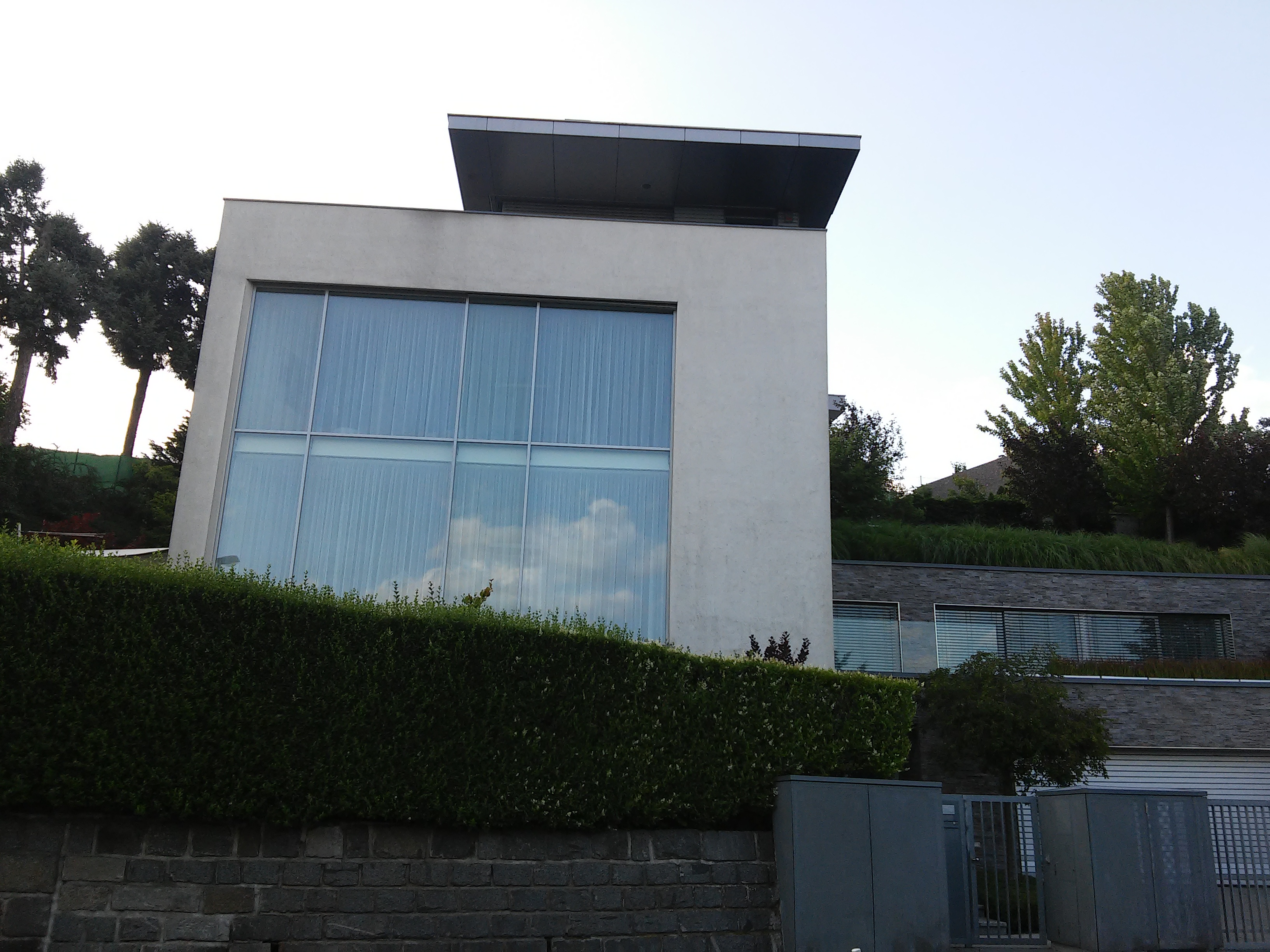 Stará Vinárska, Staré Mesto, Bratislava